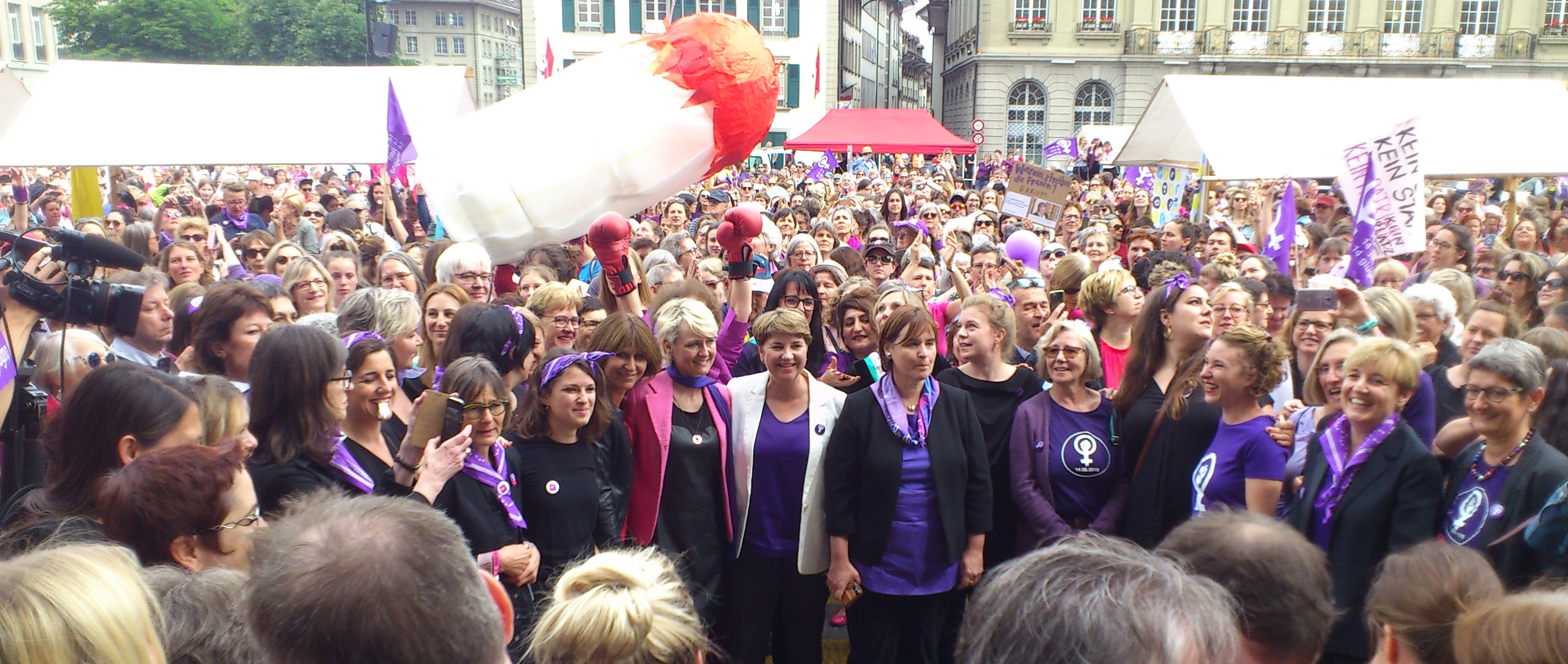 Frauenstreik in der Schweiz: in der Bildmitte Bundesrätin Viola Amherd (mit heller Jacke), rechts neben ihr Nationalratspräsidentin Marina Carobbio Guscetti, links neben ihr Nationalratsvizepräsidentin Isabelle Moret, sowie weitere Bundesparlamentarierinnen und weitere Frauen auf dem Bundesplatz während einem Sitzungsunterbruch während der Session.